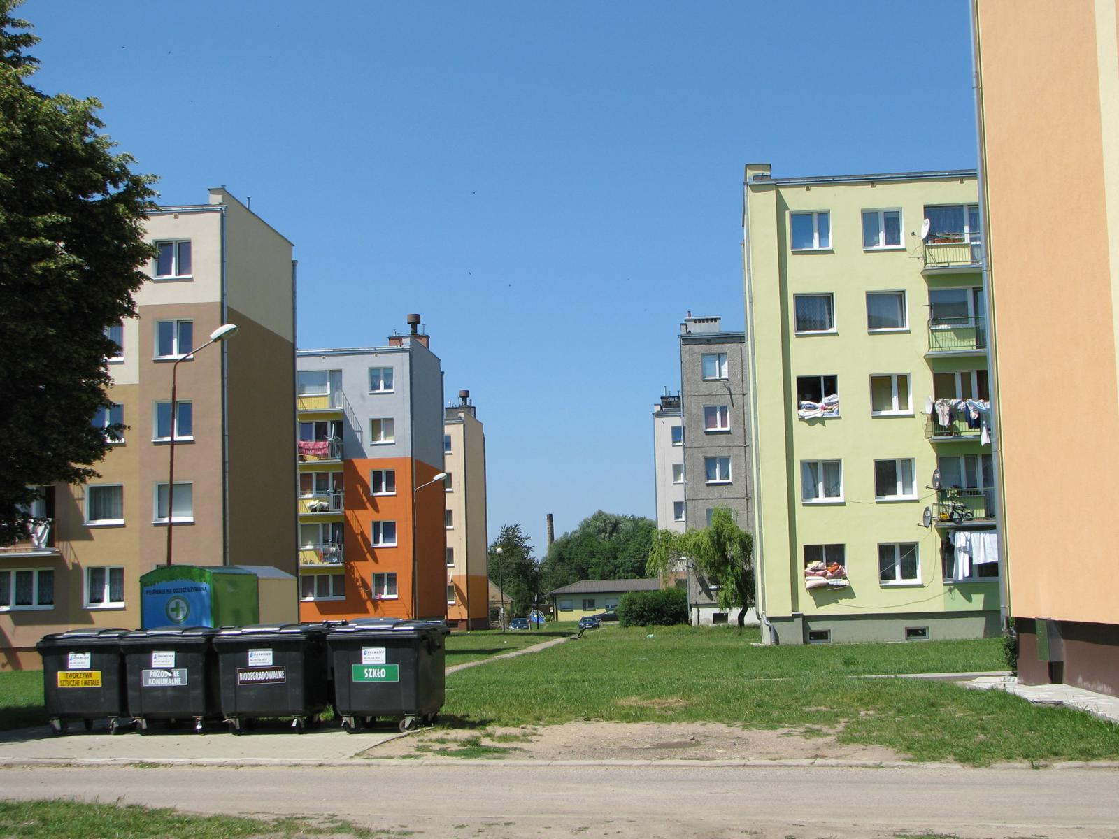 Wojcieszyce. Bloki mieszkalne.